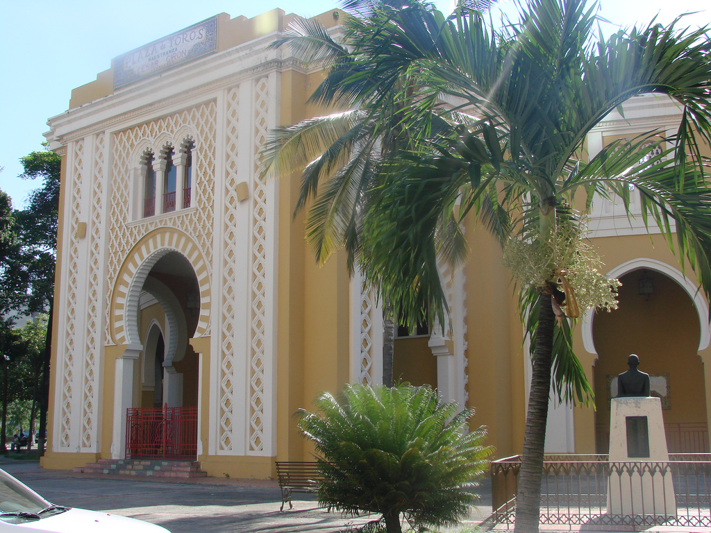 Pórtico Izquierdo de la Maestranza "César Girón". Maracay, Estado Aragua, Venezuela.